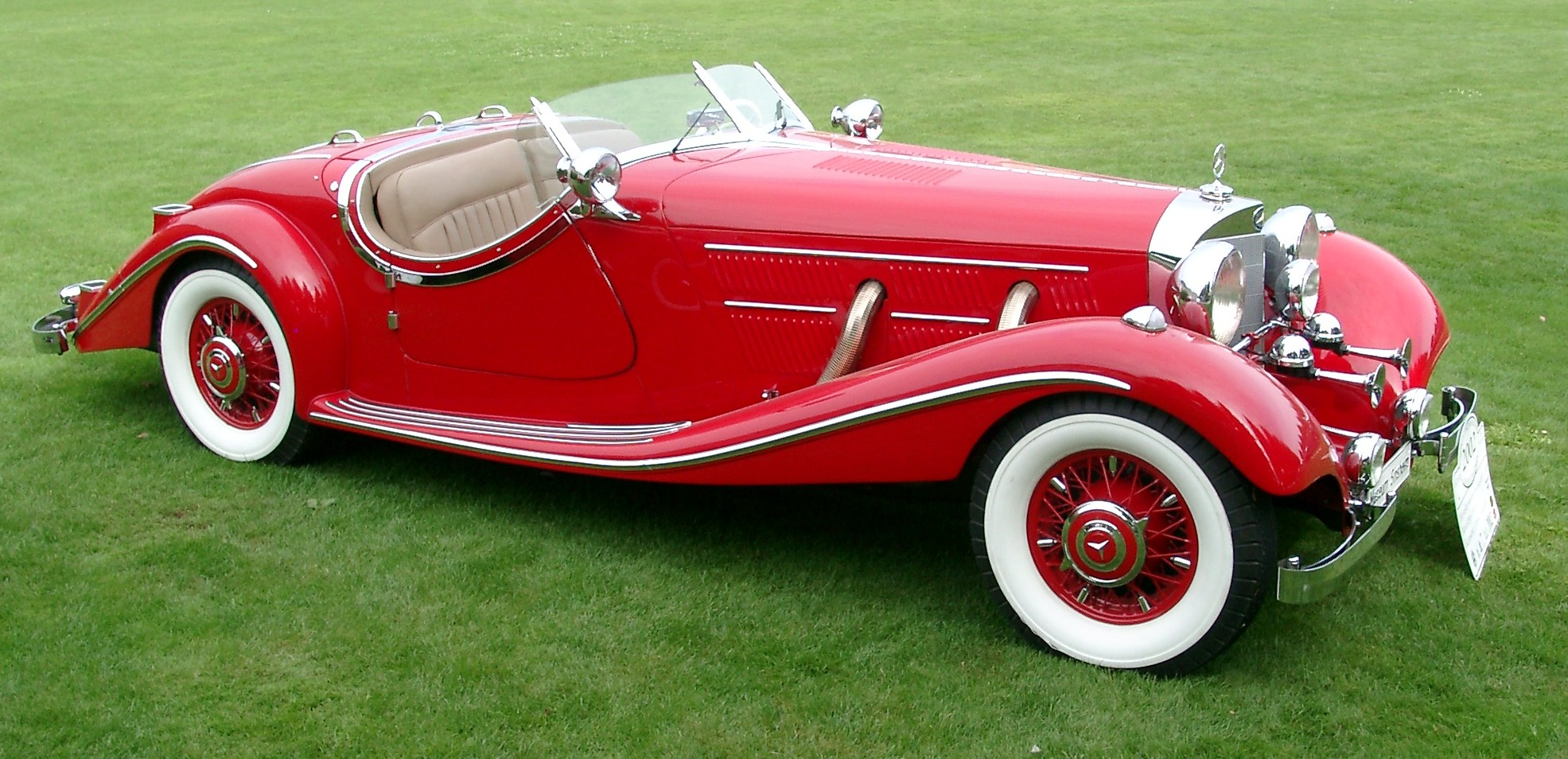 Mercedes-Benz W29 Roadster, Baujahr 1939. Fotografiert anläßlich des European Concours d'Elegance 2002 in Schwetzingen